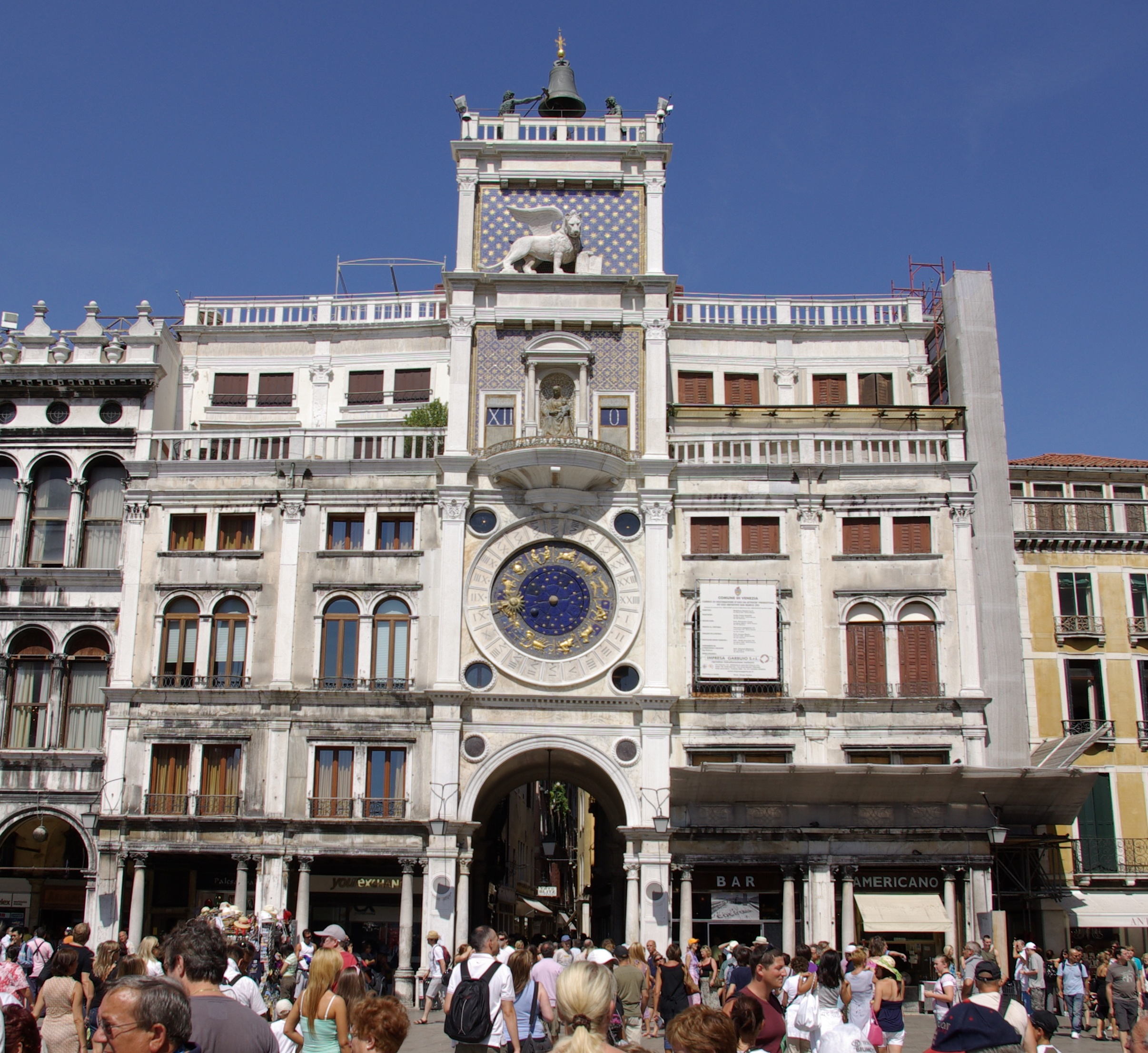 Torre dell'orologio am Markusplatz in Venedig